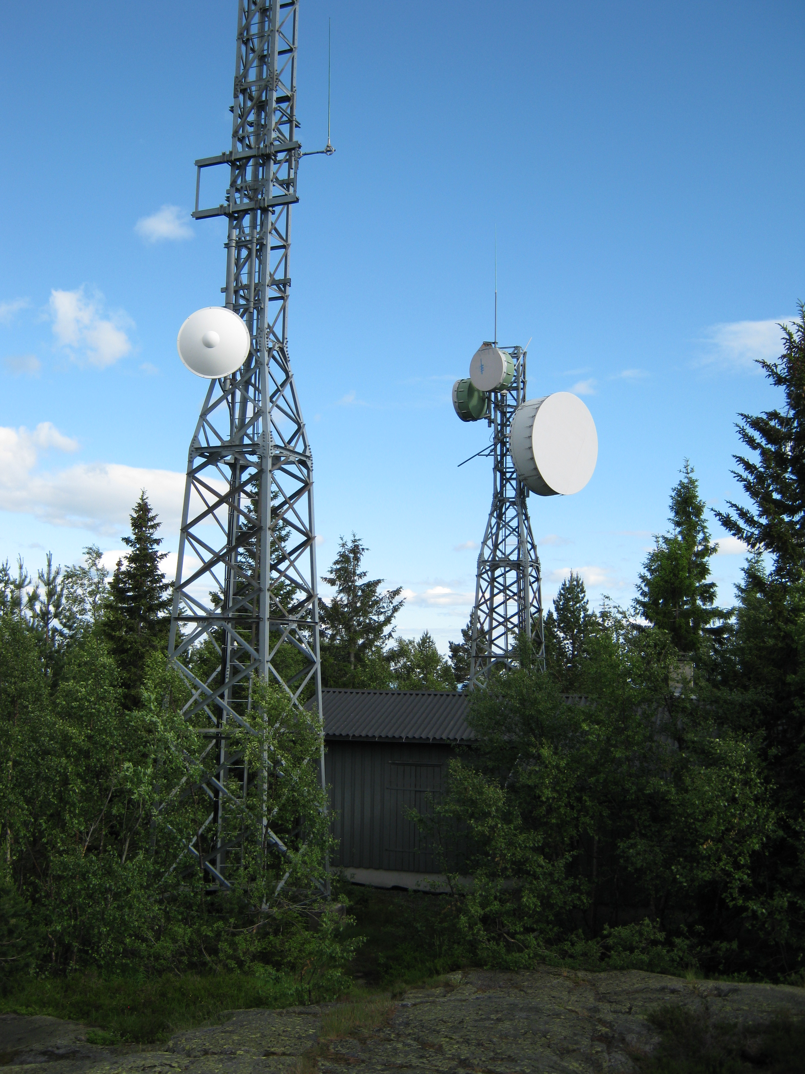 Radiolinjeutstyr på toppen av Skibergfjell i Hof i Vestfold